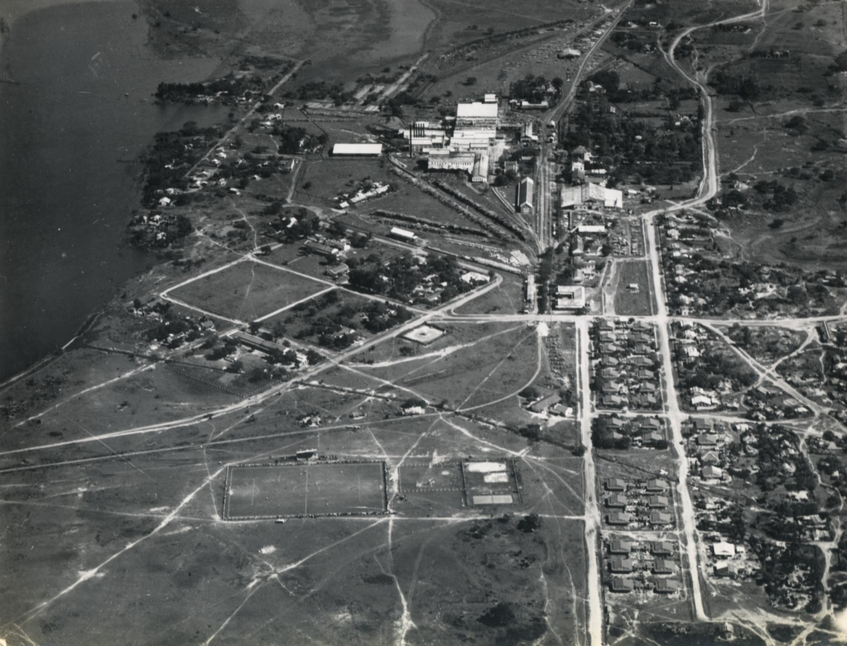 Vista áerea del ex Ingenio Las Palmas, Chaco. En la foto se puede ver el campo de fútbol de la localidad.